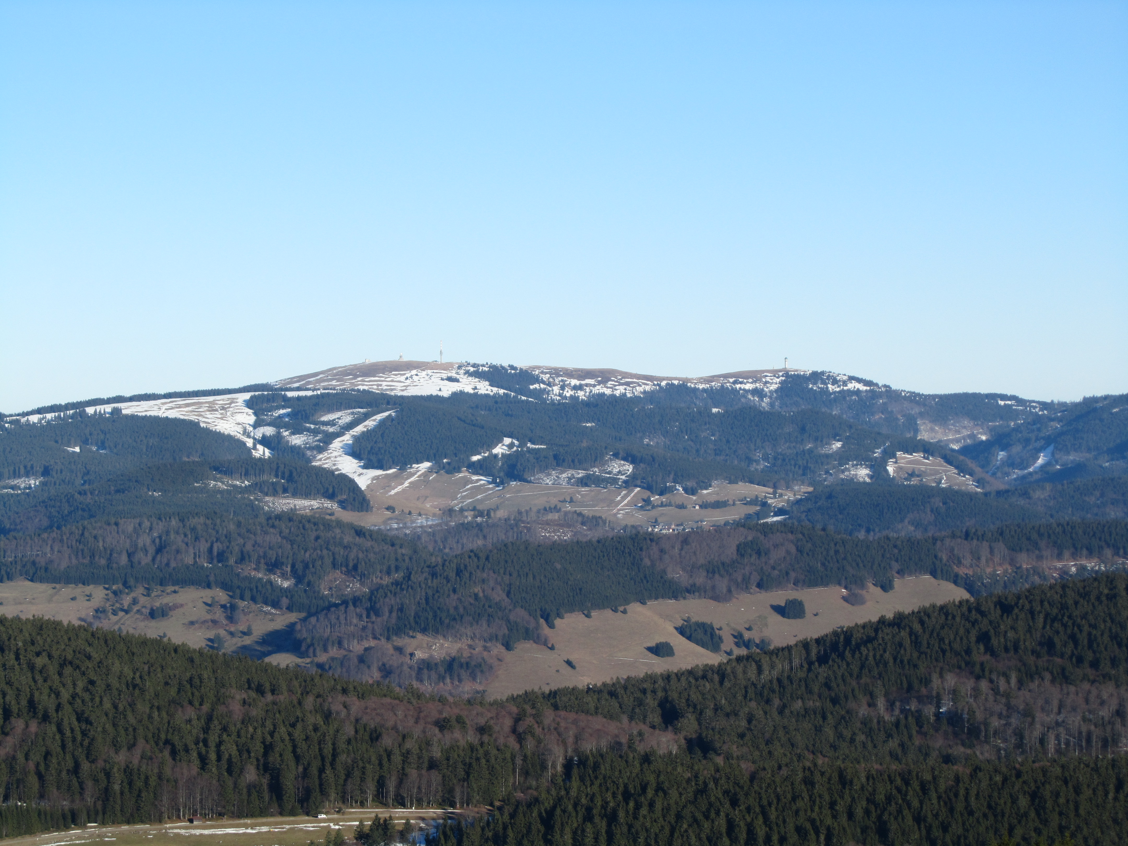 Feldberg (links, 1493 m) und Seebuck (rechts 1448 m), dazwischen das Grüble (1419 m). Aufnahme vom Belchen (1414 m) mit Blickrichtung Nordost.